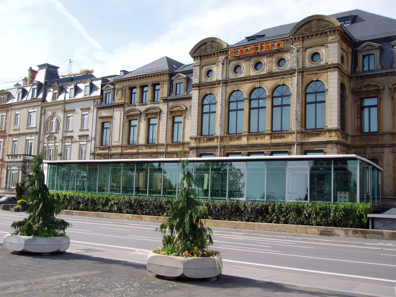 Den ale Casino an der Stad Lëtzebuerg.